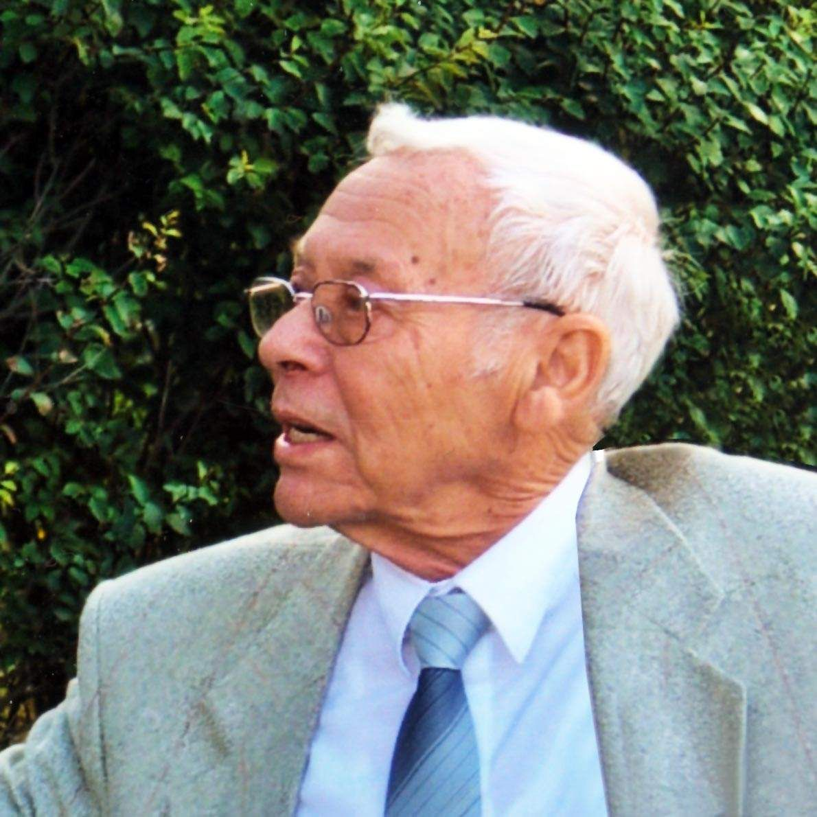 Oskar Hauser, Physikprofessor